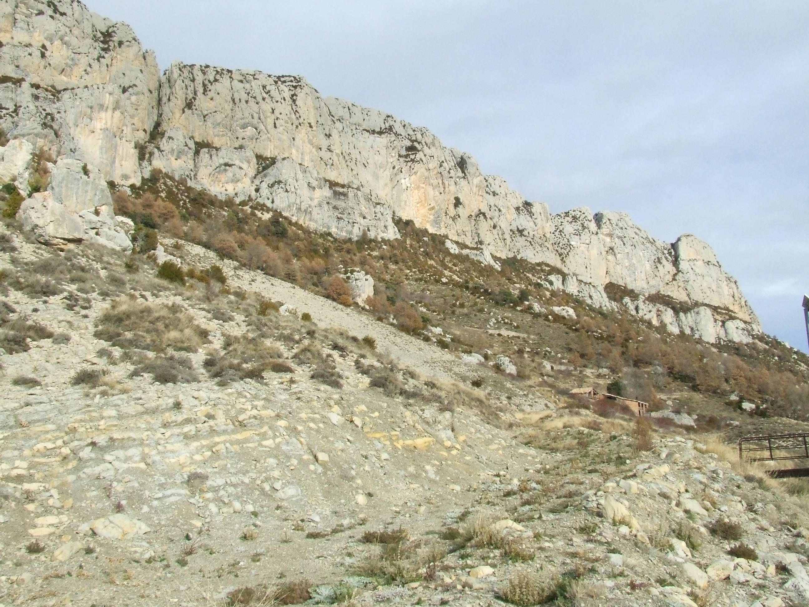 La Serra de Carreu a la zona de Pical Ras (la Torre d'Eroles, Abella de la Conca, Pallars Jussà)